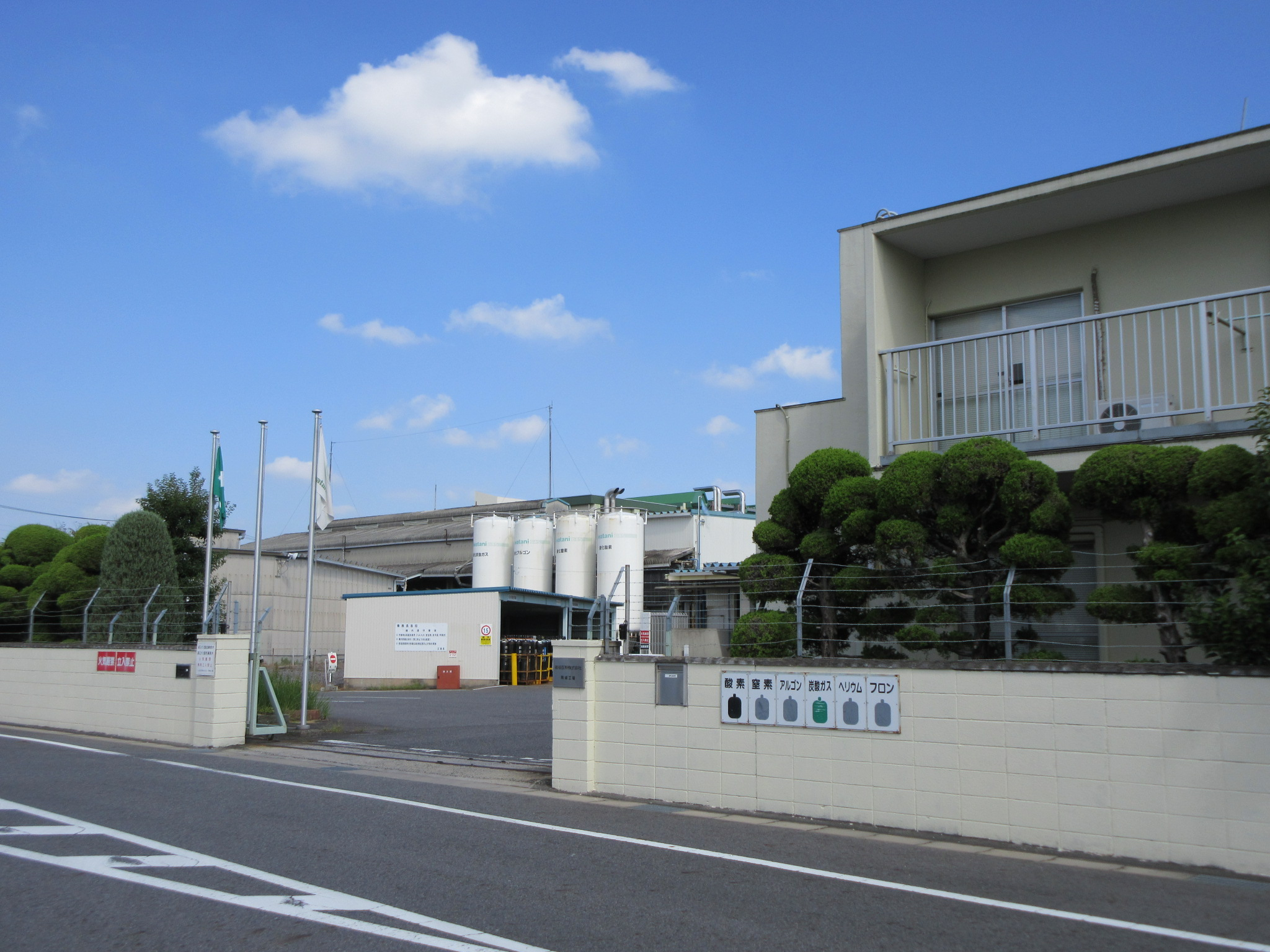 岩谷瓦斯 岡崎工場（岡崎市大門）